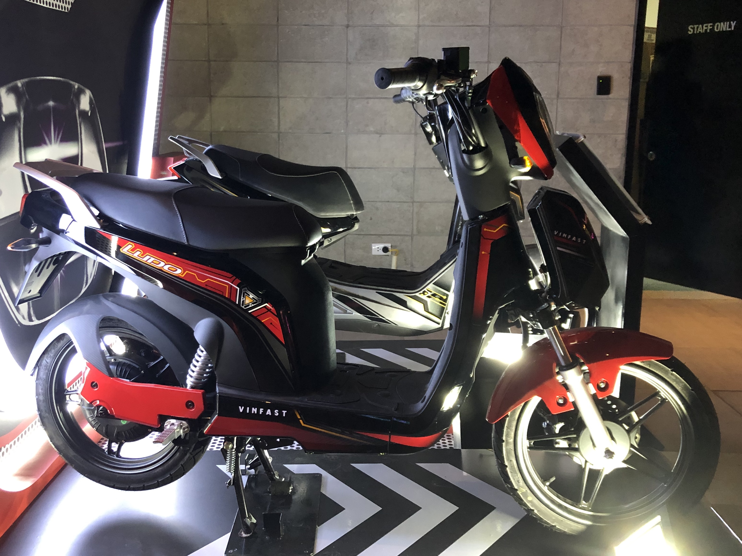 Xe máy điện VinFast Ludo màu xanh lơ